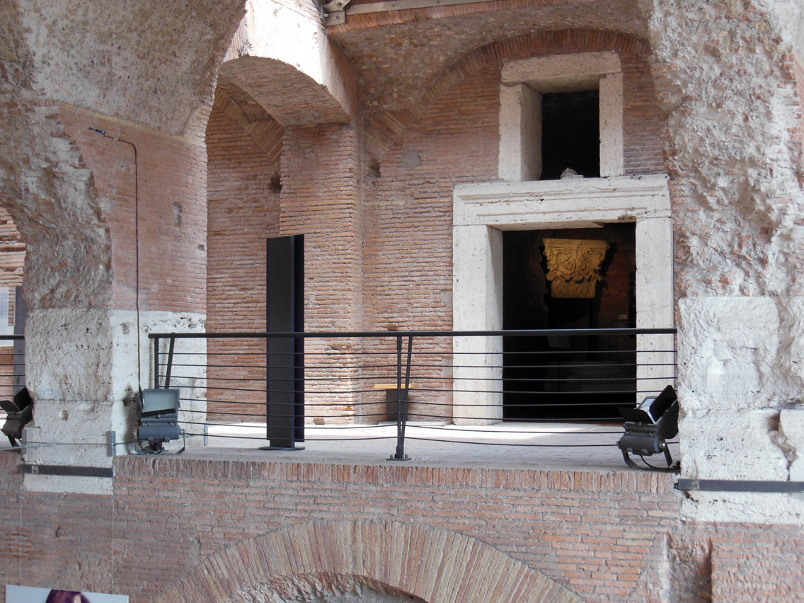 Mercati di Traiano, Museo dei Fori imperiali, capitello con Pegasi dalla decorazione interna del tempio di Marte Ultore nel Foro di Augusto, esposto in uno degli ambienti al primo piano della "Grande aula" (sezione "Memoria dell'antico" del museo)